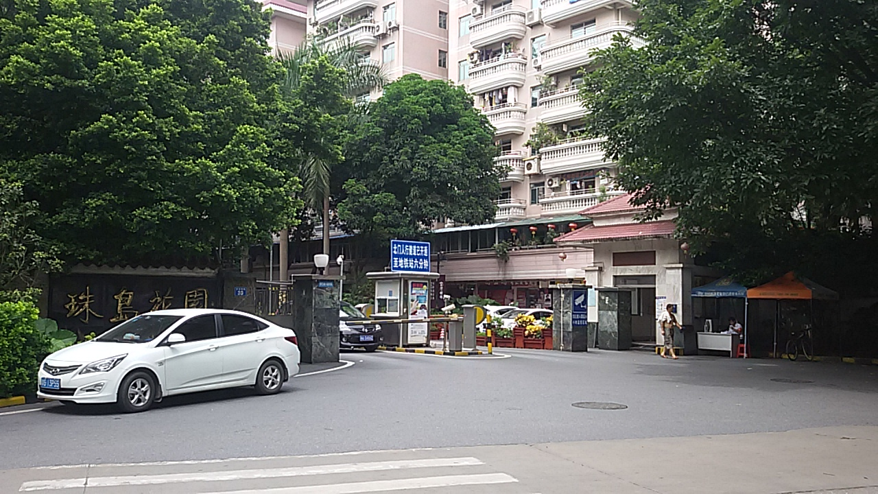 粵語: 珠岛花园东门